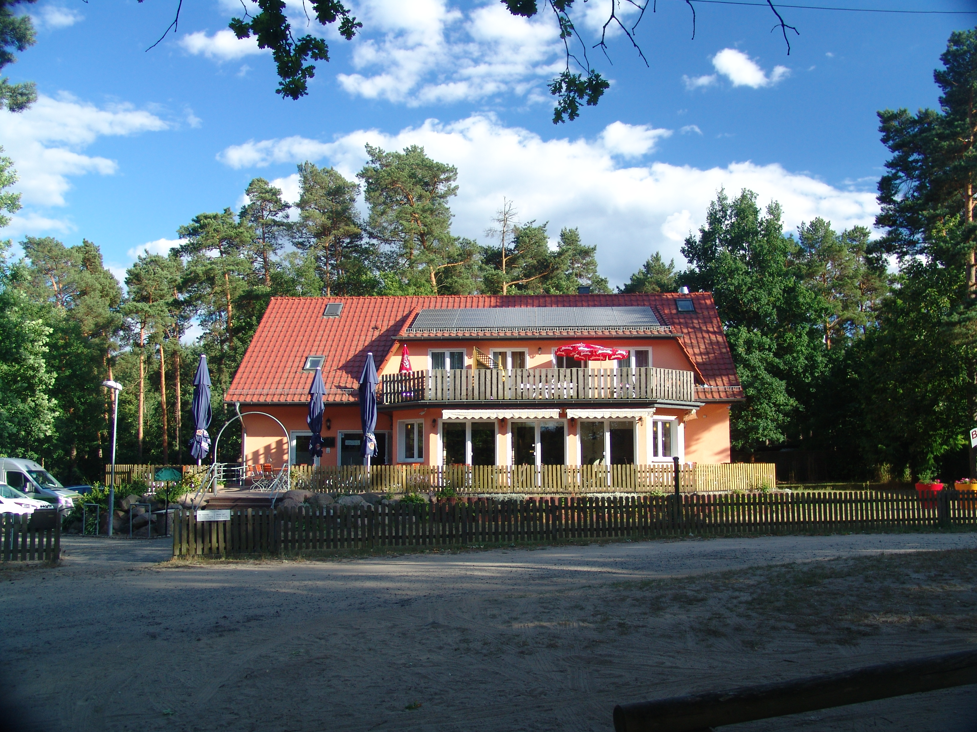 Böhmerheide, Schorfheide: Das Cafe am Weissen See oberhalb der öffentlichen Badestelle